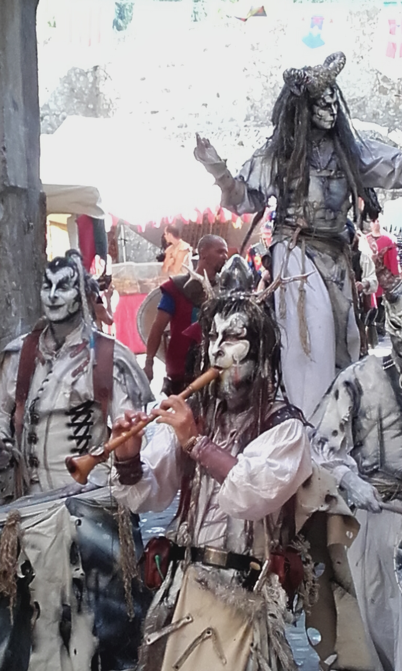 Alpes-de-Haute-Provence, Colmars. La Fête Médiévale de Colmars-les-Alpes fête ses 25 ans du 9 au 11 août 2019